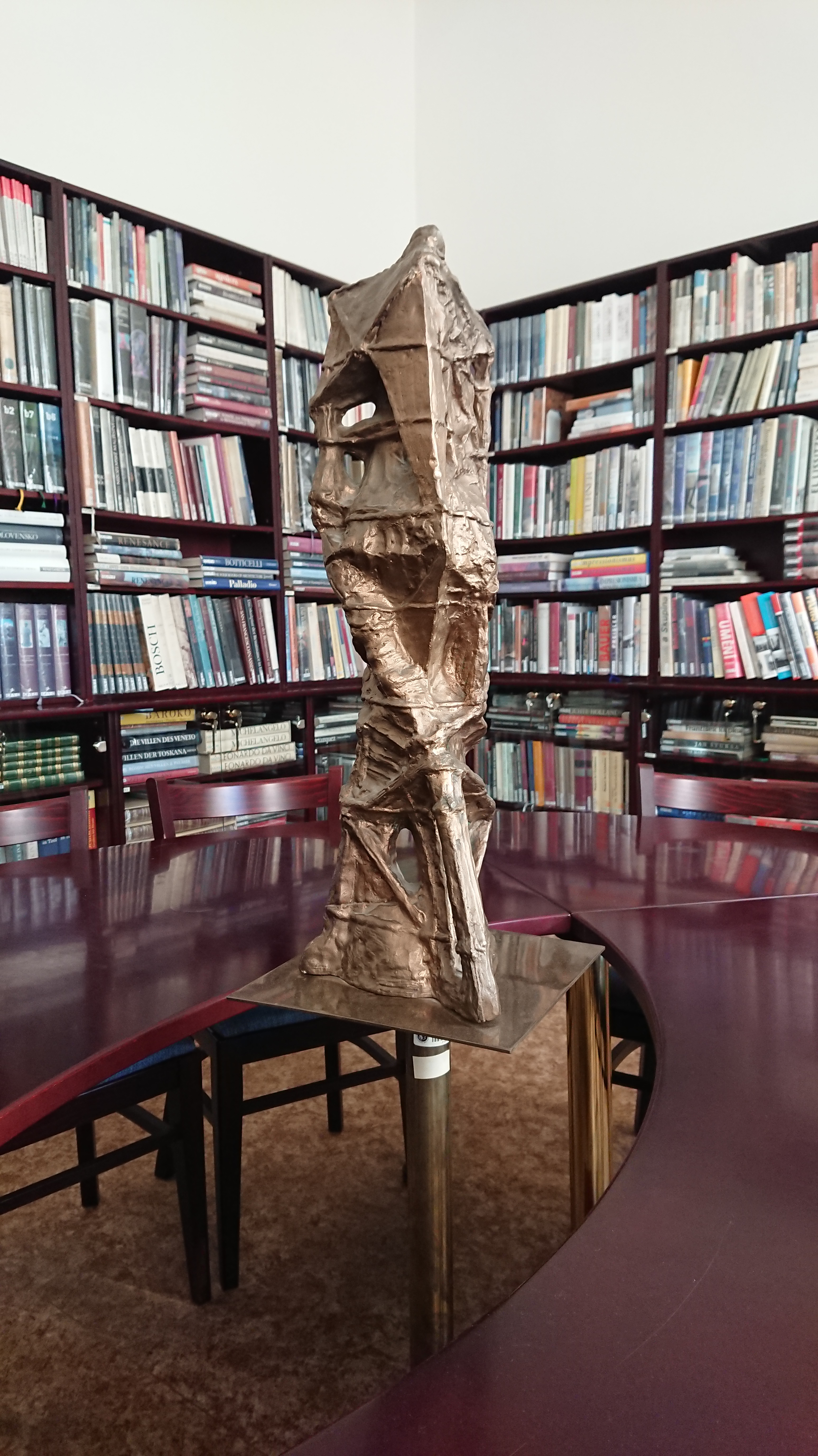 Gettyho knihovna, jedna ze studoven Semináře dějin umění Masarykovy univerzity. Uprostřed stolu plastika Mnémosyné od Nikose Armutidise z roku 1994.